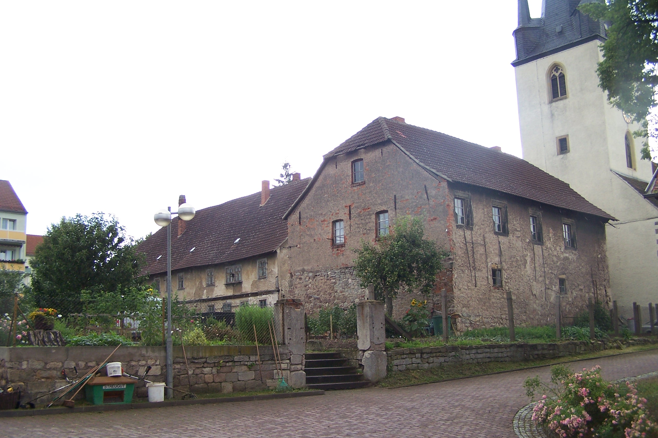 GTH Mechterstädt, Kemenate Teilansicht von Südwesten